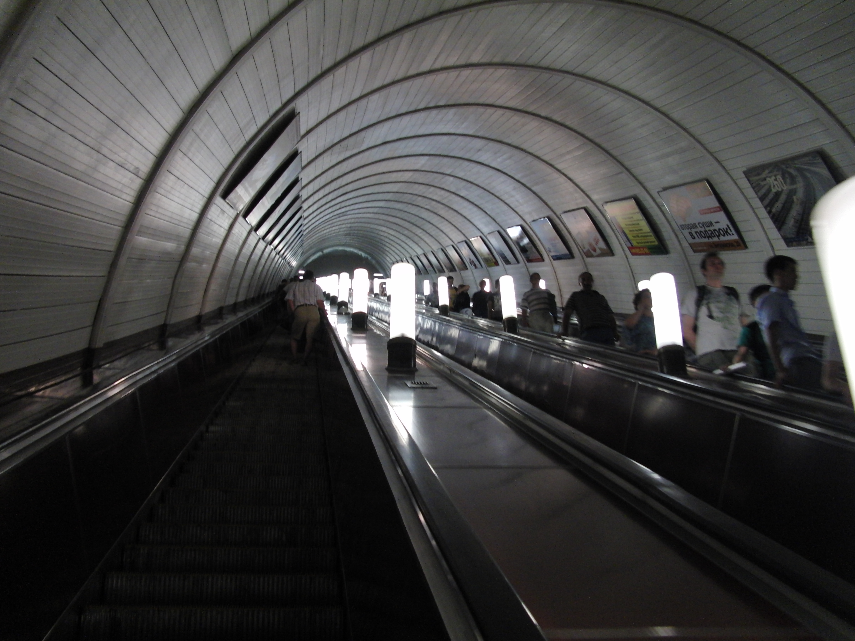 Aviamotornaya (Авиамоторная)